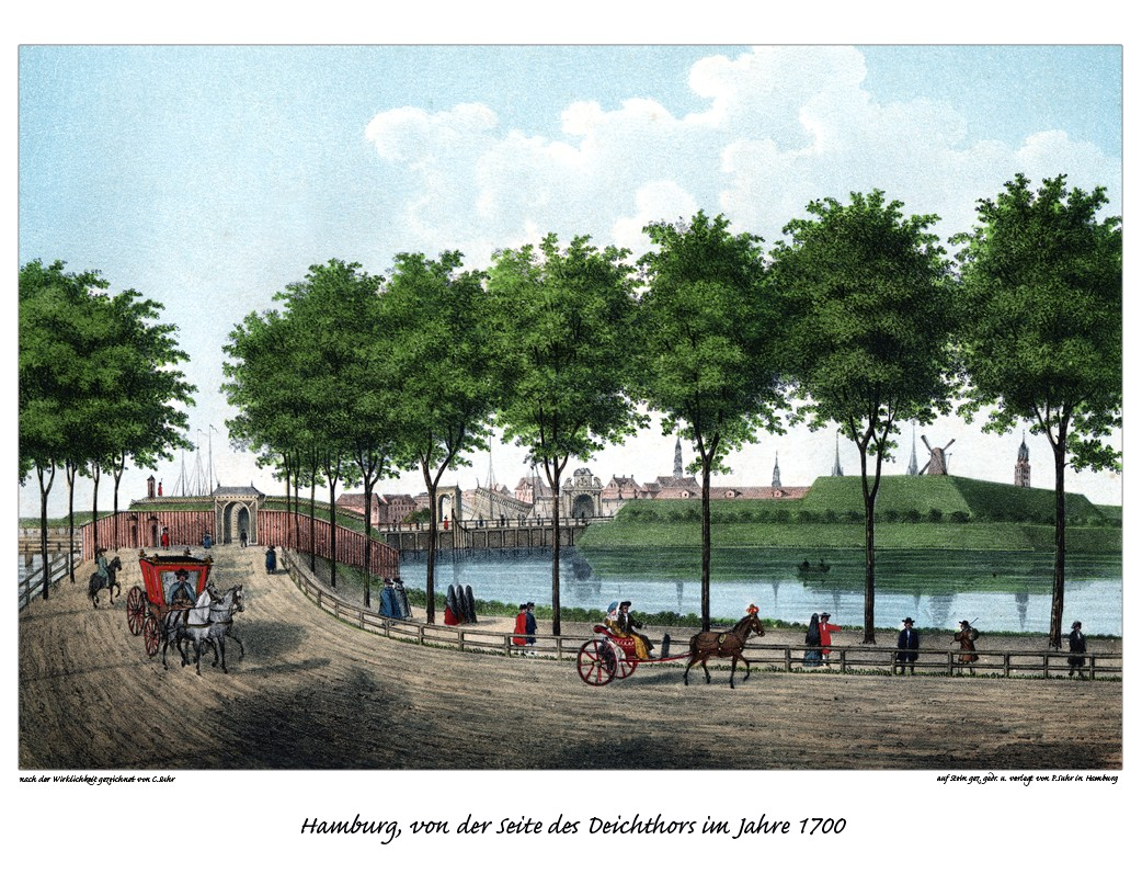 Hamburg, von der Seite des Deichthors im Jahre 1700 - Das Bild zeigt das Deichtor mit der Stadtbefestigung und dahinter die Altstadt.